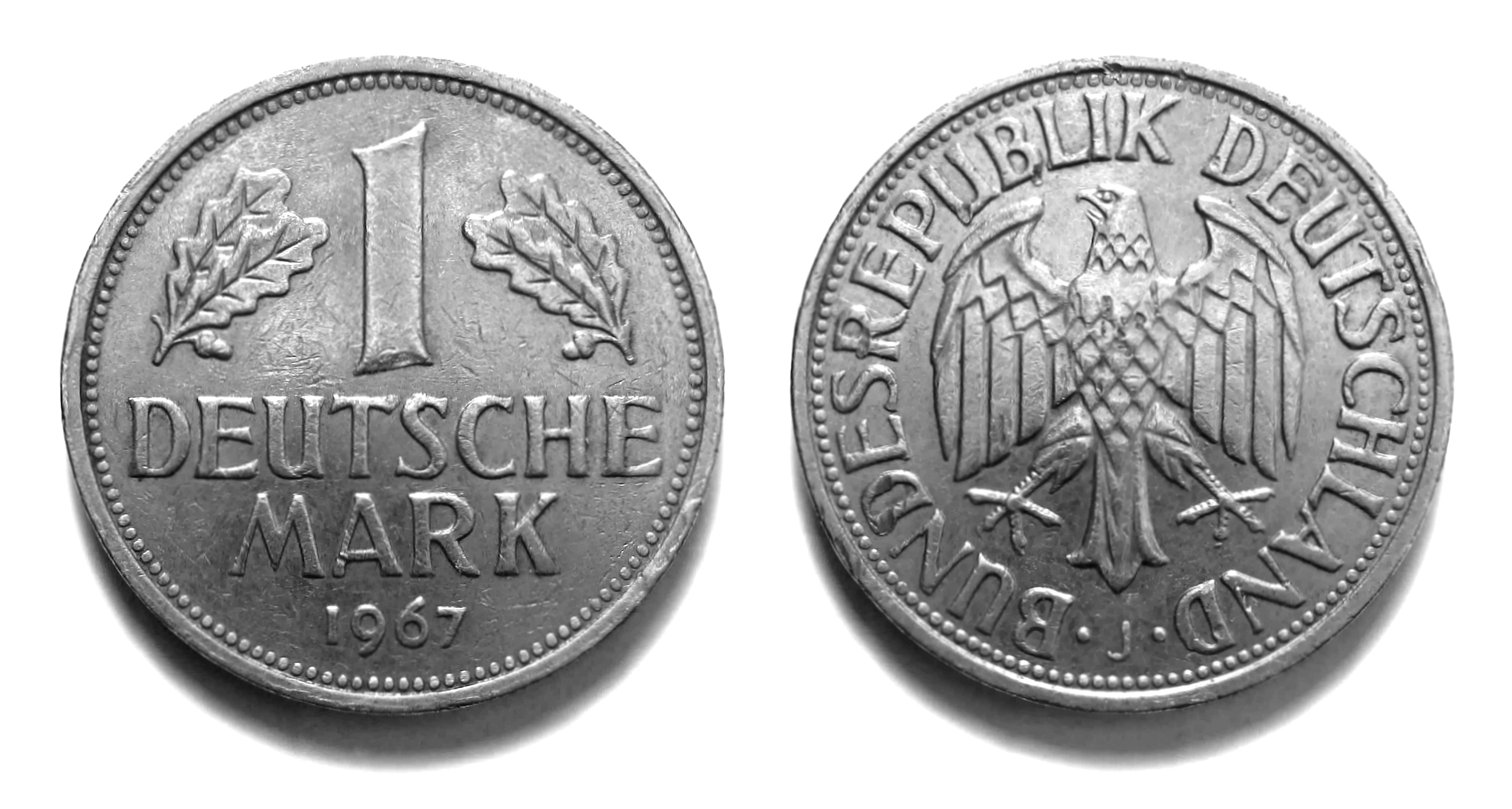 Retouched version of Bild:1 mark brd 1967.jpg, which has the following description: Beschreibung, Quelle == Information Beschreibung = 1 Mark der Bundesrepublik Deutschland aus dem Jahre 1967 Quelle = selbst fotografiert Urheber = lordnikon Datum = 16.Januar 2008